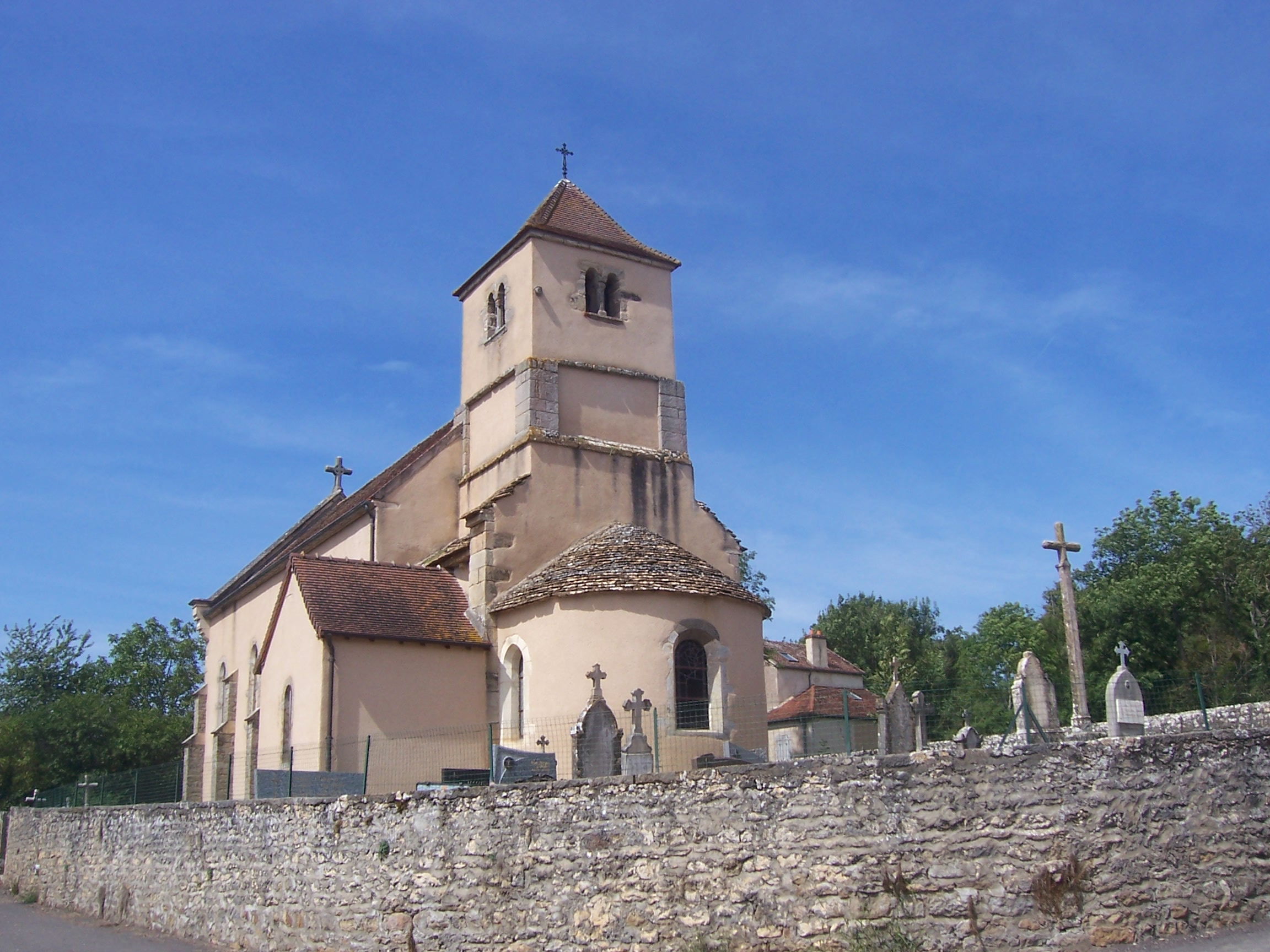 Eglise de Chérizet